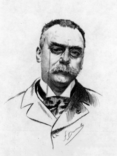 French/Swiss artist Eugène Grasset (1845-1917)